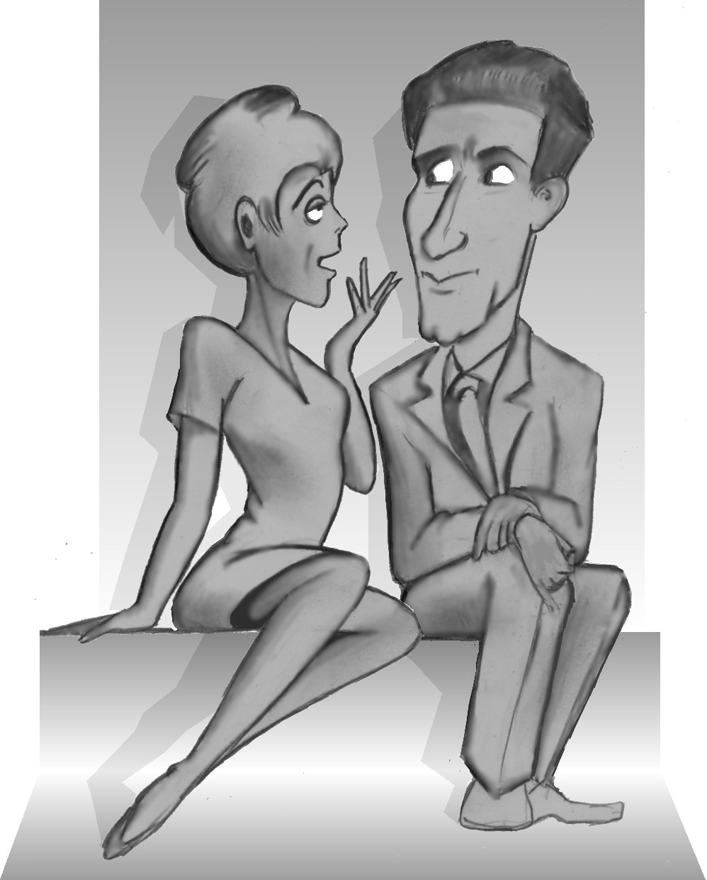 Caricature de Baghy, parue dans "La Ondo", par Serge Sire